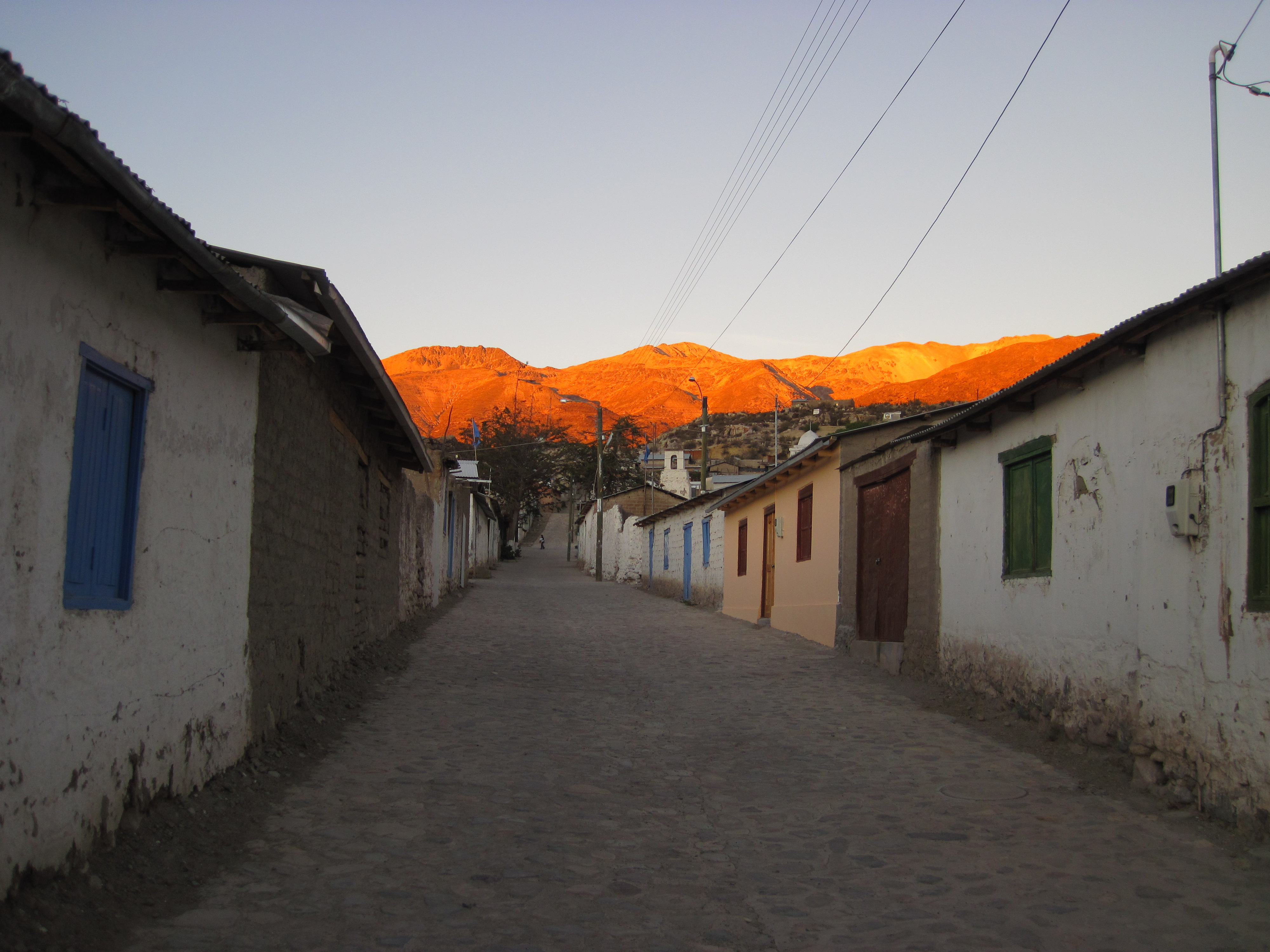 Poblado de Belén, Chile.